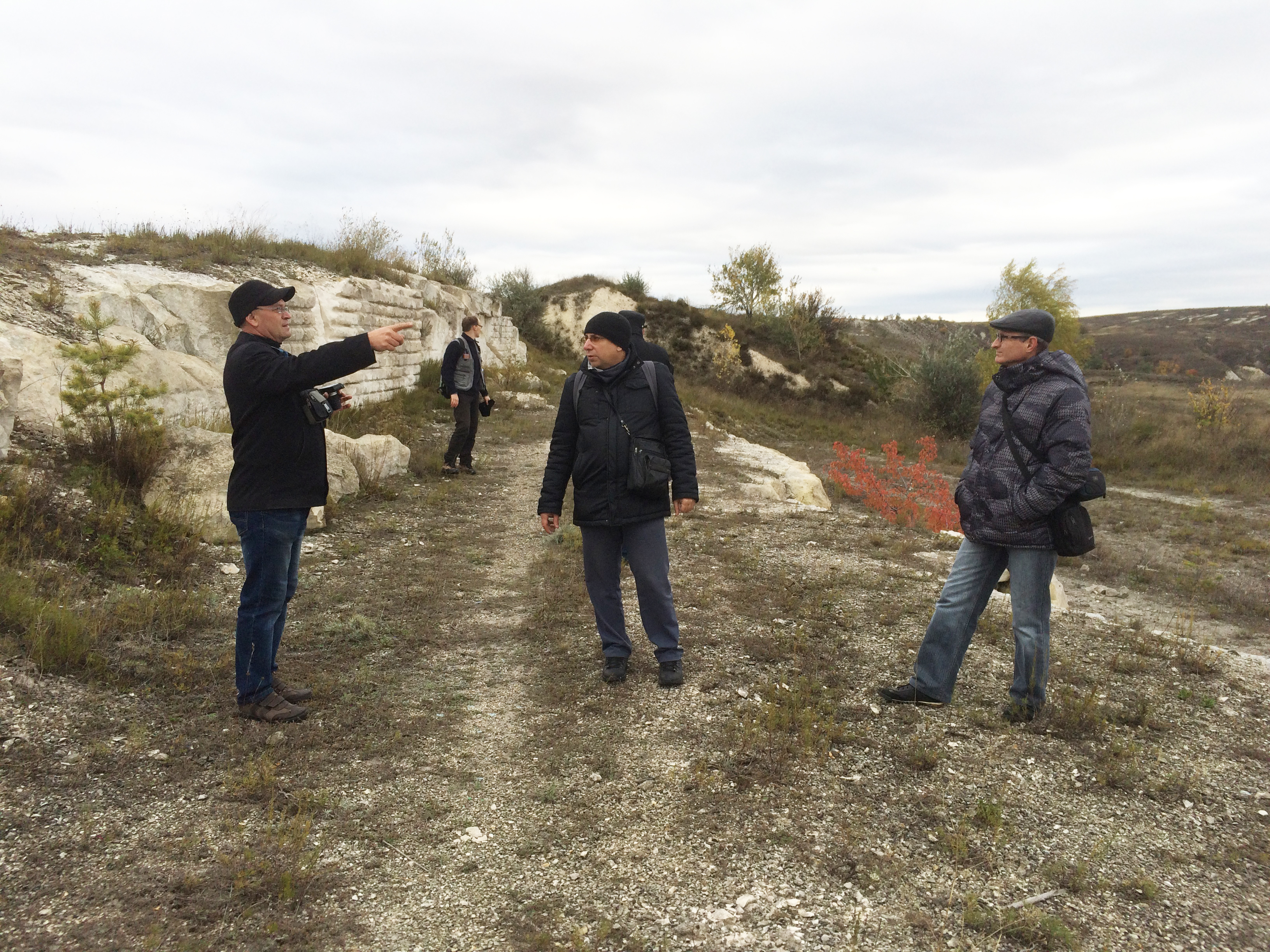 Крейдова флора - обстеження території 16-10-2016